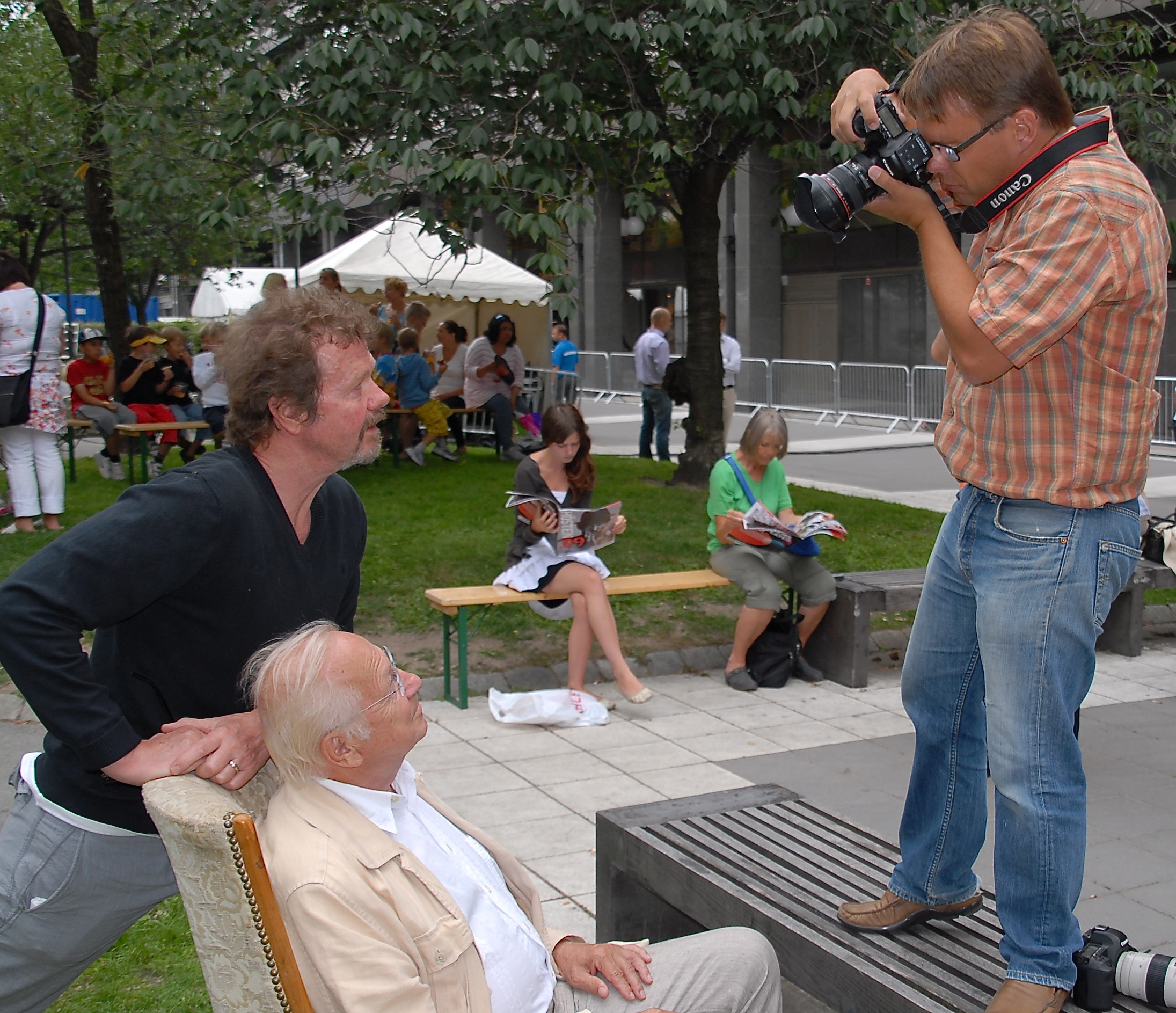 Göran Stangertz & Ingvar Hirdwall under Stockholms Kulturfestival den 11 augusti 2009.